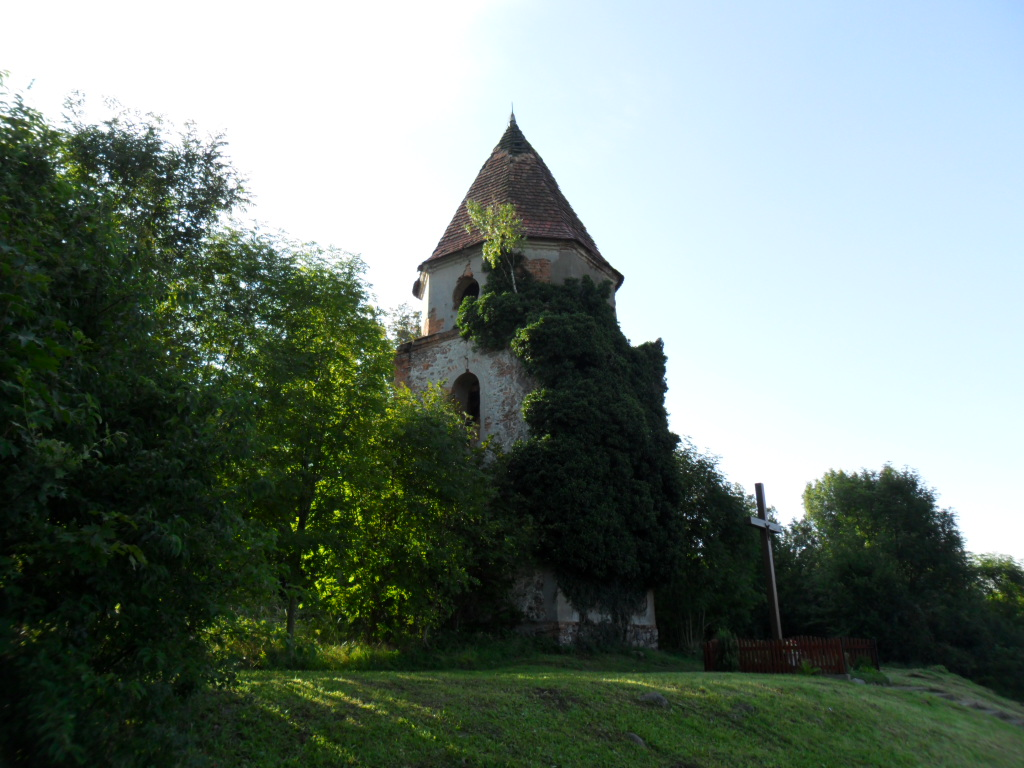 Ruiny dzwonnicy w Zimnej Brzeźnicy.